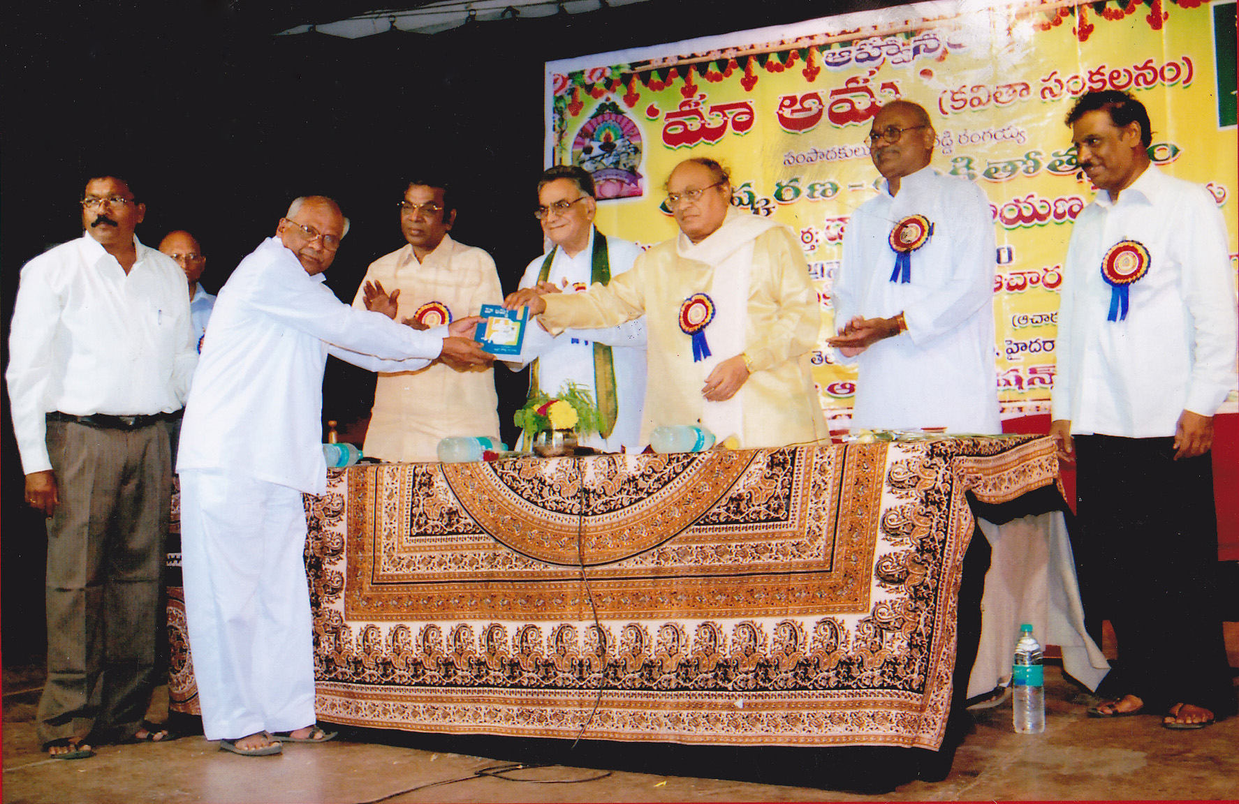 మా అమ్మ గ్రంధ తొలి ప్రతిని ఆచార్య శ్రీ సి నారాయణ రెడ్డి, పొత్తూరి వెంకటేశ్వర రావు, ఆచార్య ఎన్.గోపి గార్లు డాక్టర్ కూరెళ్ళ గారికి అందజేస్తున్న దృష్యం